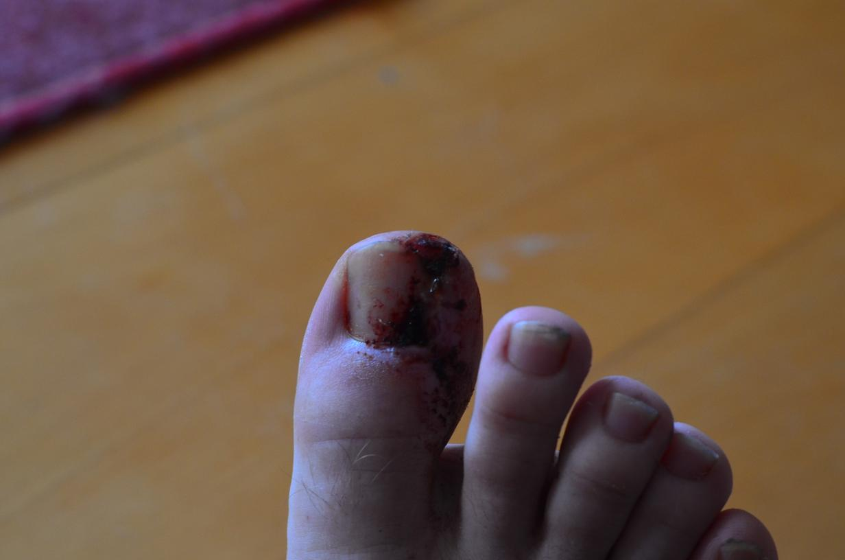 Großer Zehe des rechten Fußes in der zweiten Woche nach einer Behandlung eines Unguis Incarnatus mit dem Emmert-Plastik verfahren.